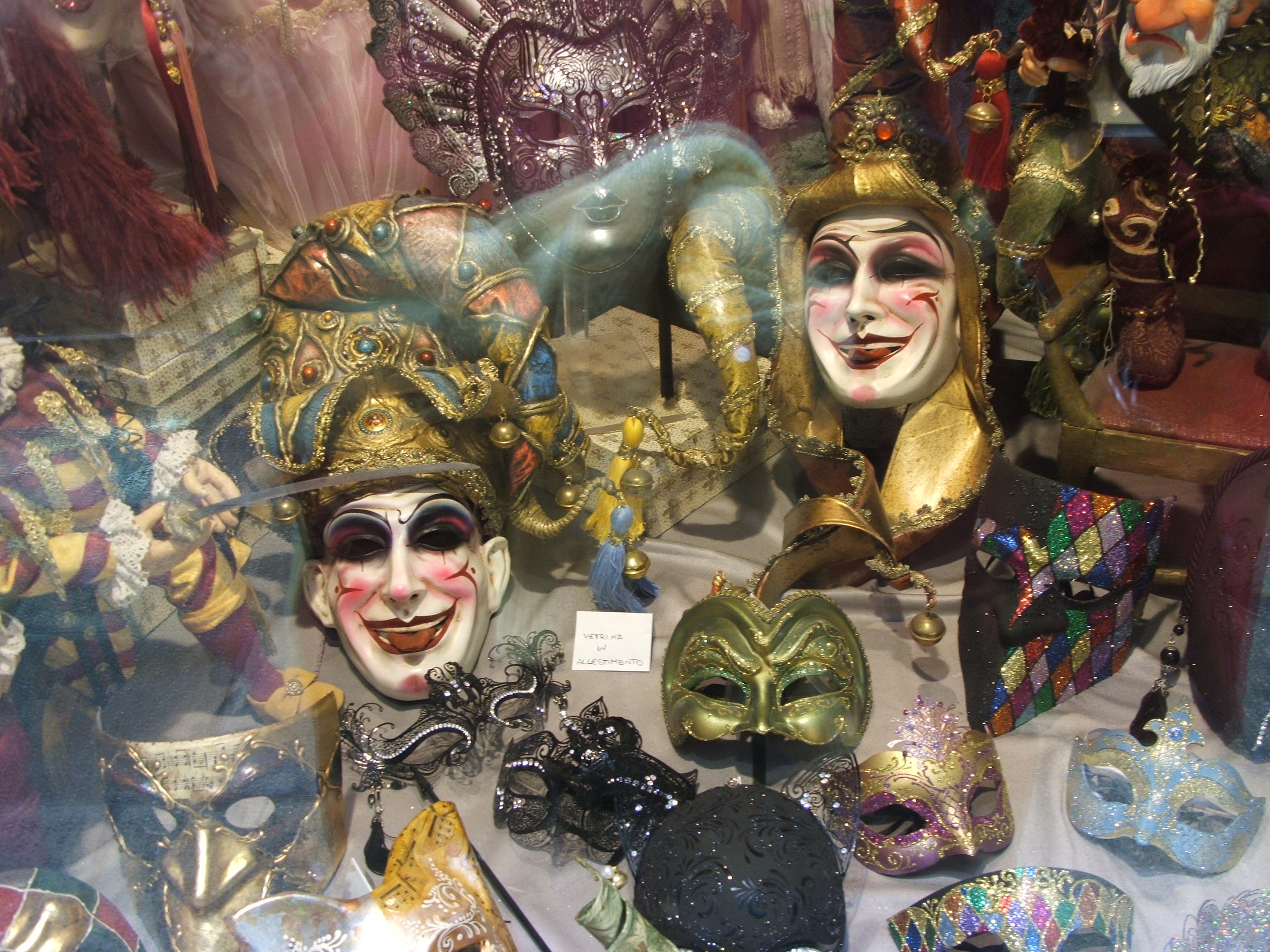 Immagine dal Carnevale di Venezia